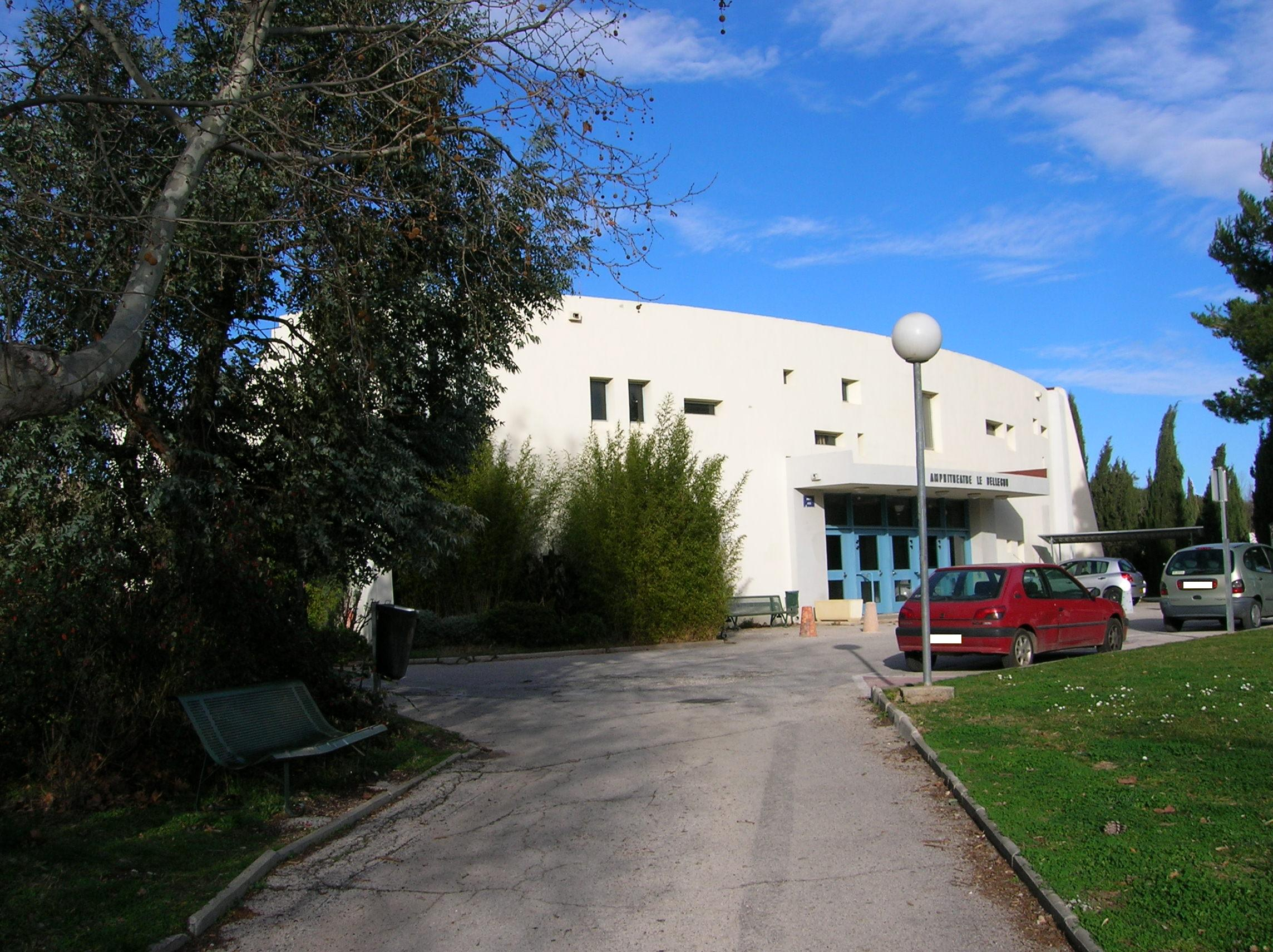 Amphithéâtre 400 au sein de l'USTV.